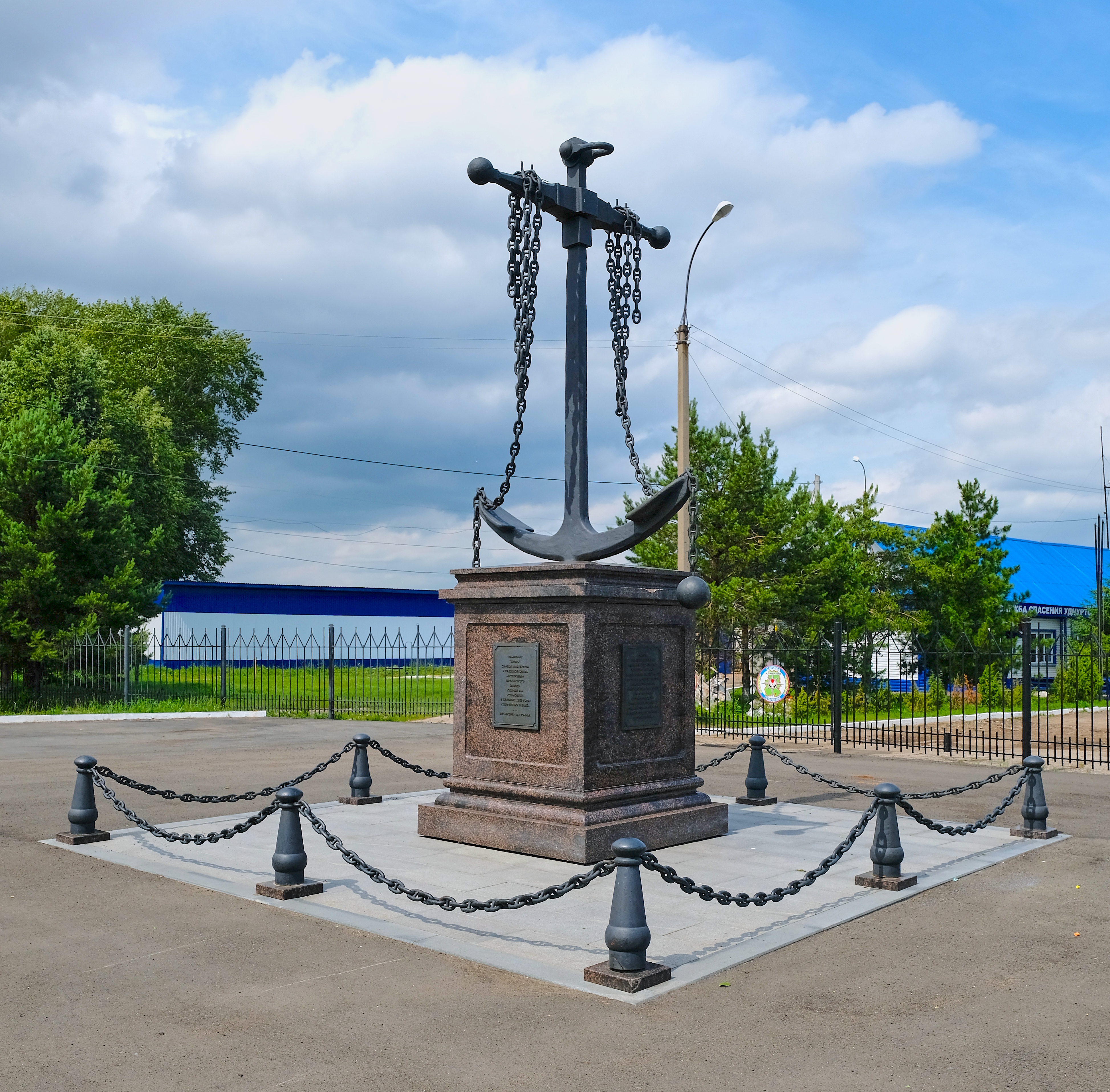 Памятник якорю Воткинского завода на набережной Воткинского пруда